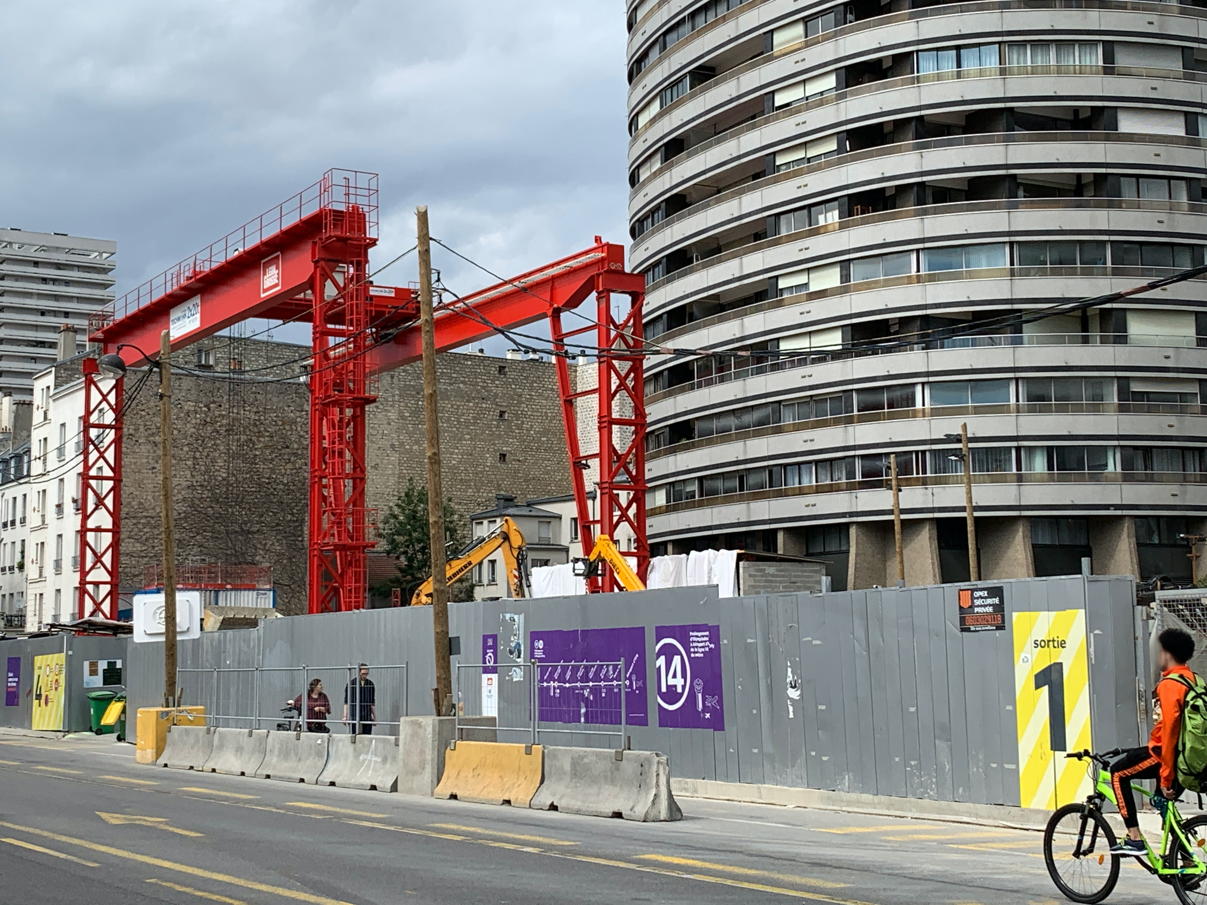 Chantier de la station de métro Maison Blanche - Paris XIIIe, ligne 14 du métro de Paris, Paris.